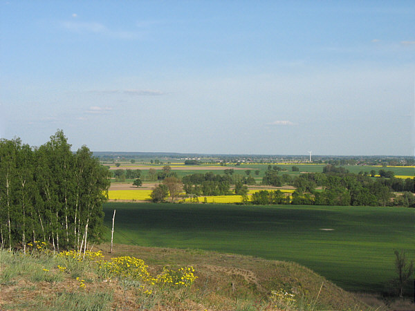 Blick von der Insel Neuenhagen nach Süden über das Oderbruch